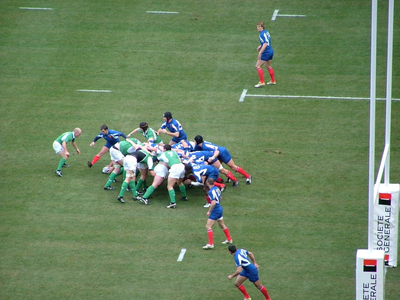 Le XV de France de rugby lors de France-Irlande du tournoi des six nations 2006 au Stade de France